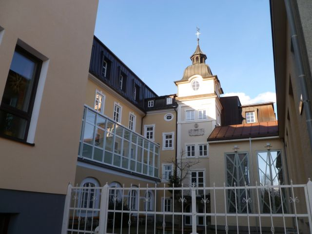 Schloss_Schönleiten-Rest_des_ursprünglichen_Schlosses